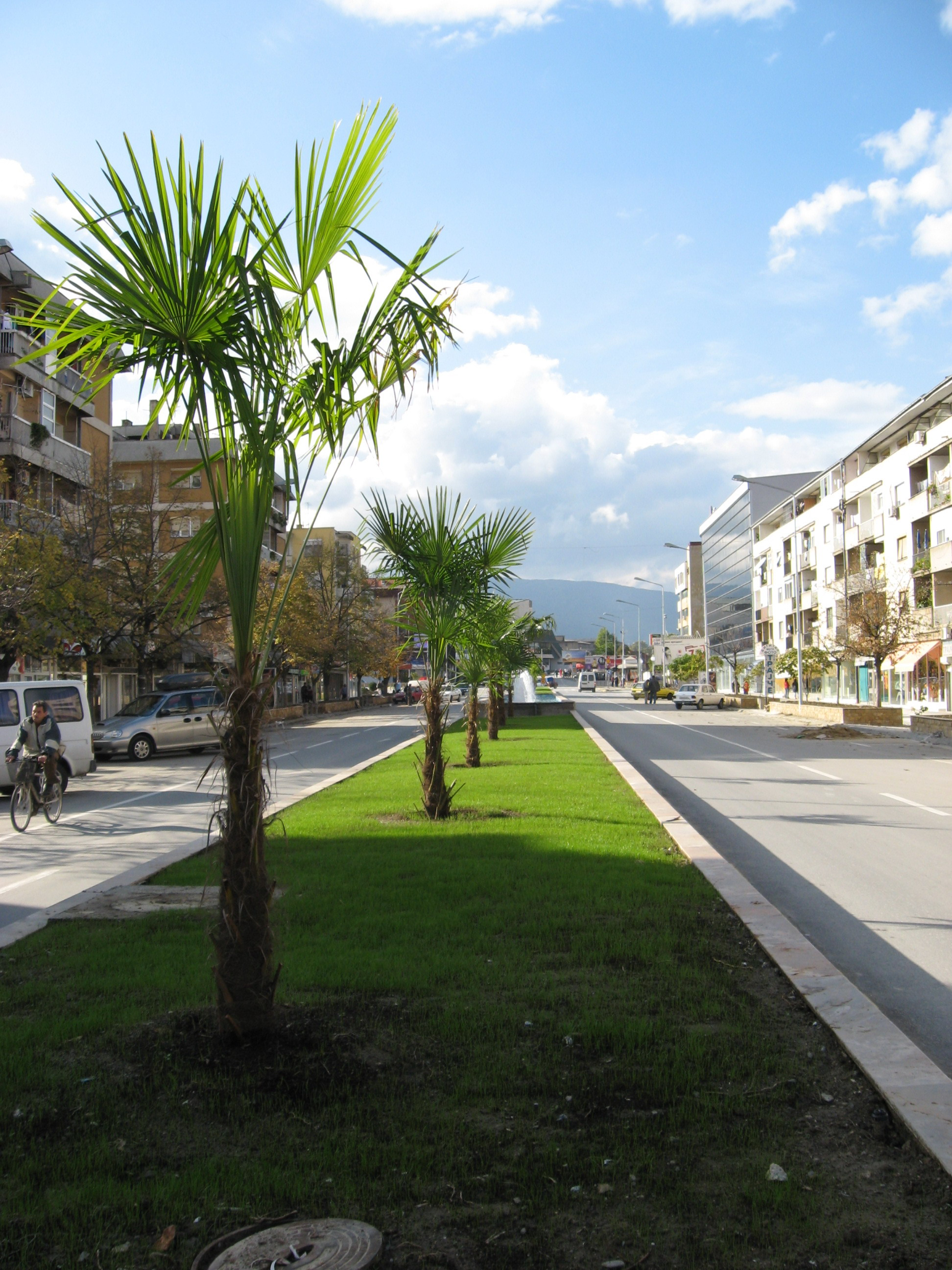 Centarot na Strumica